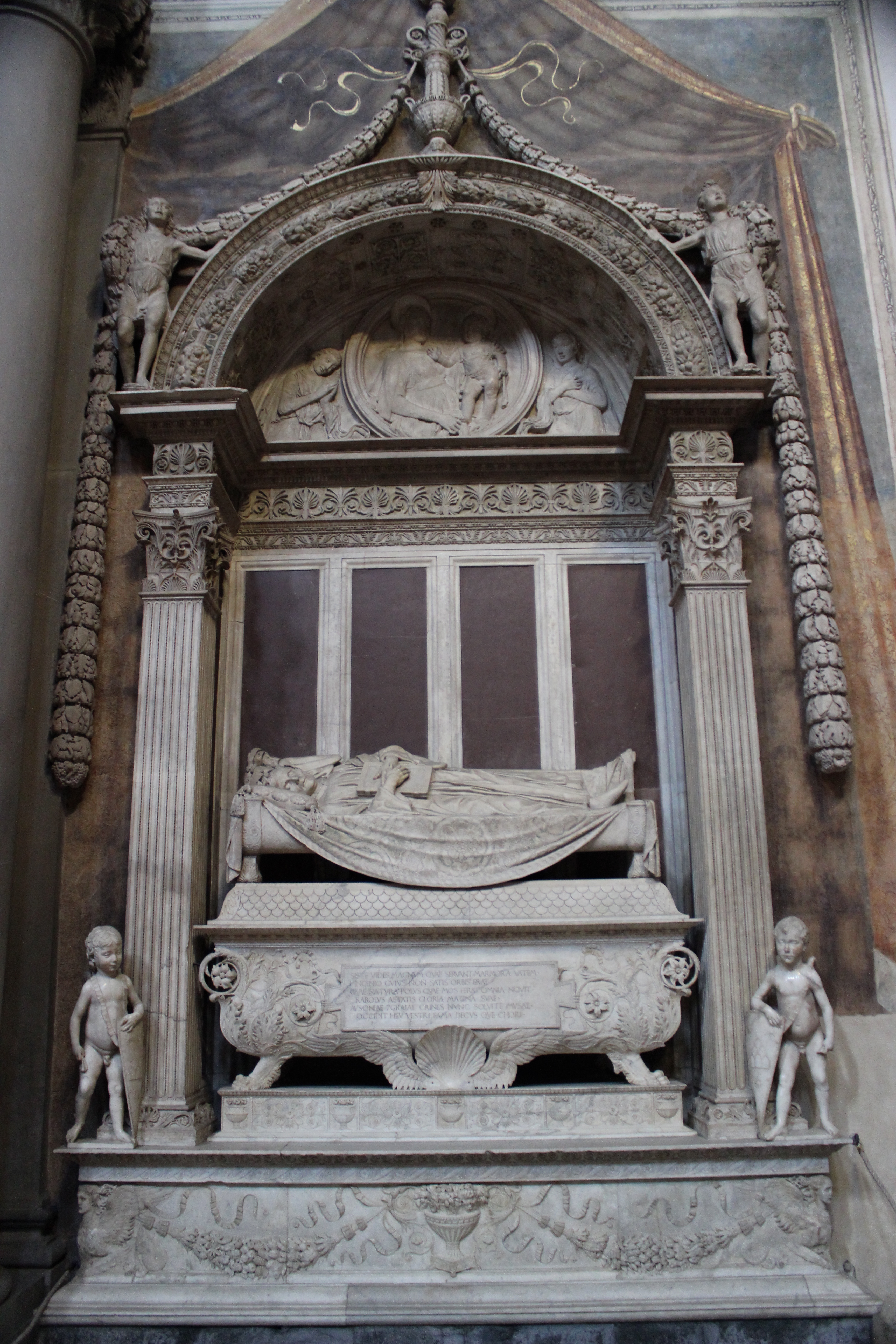 Florencia, Santa Croce. Tumba de Carlo Marsuppini.